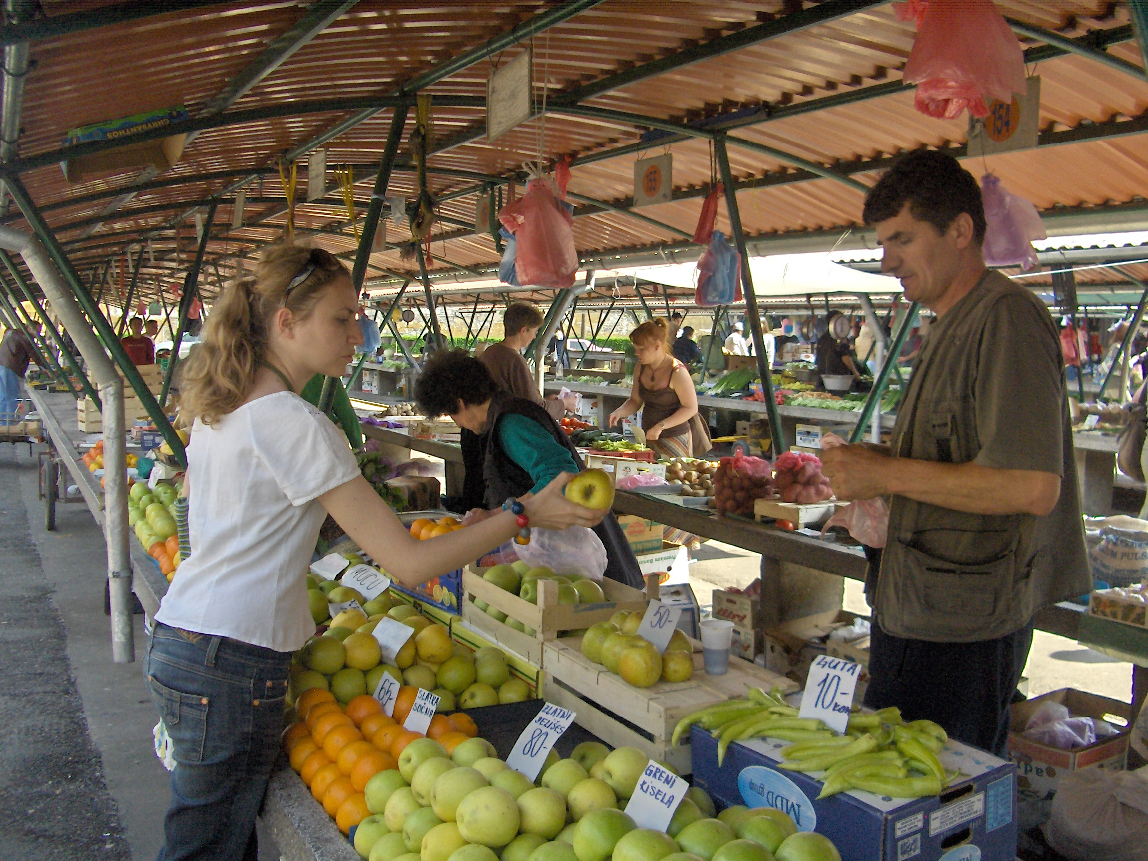 Pijaca_NS